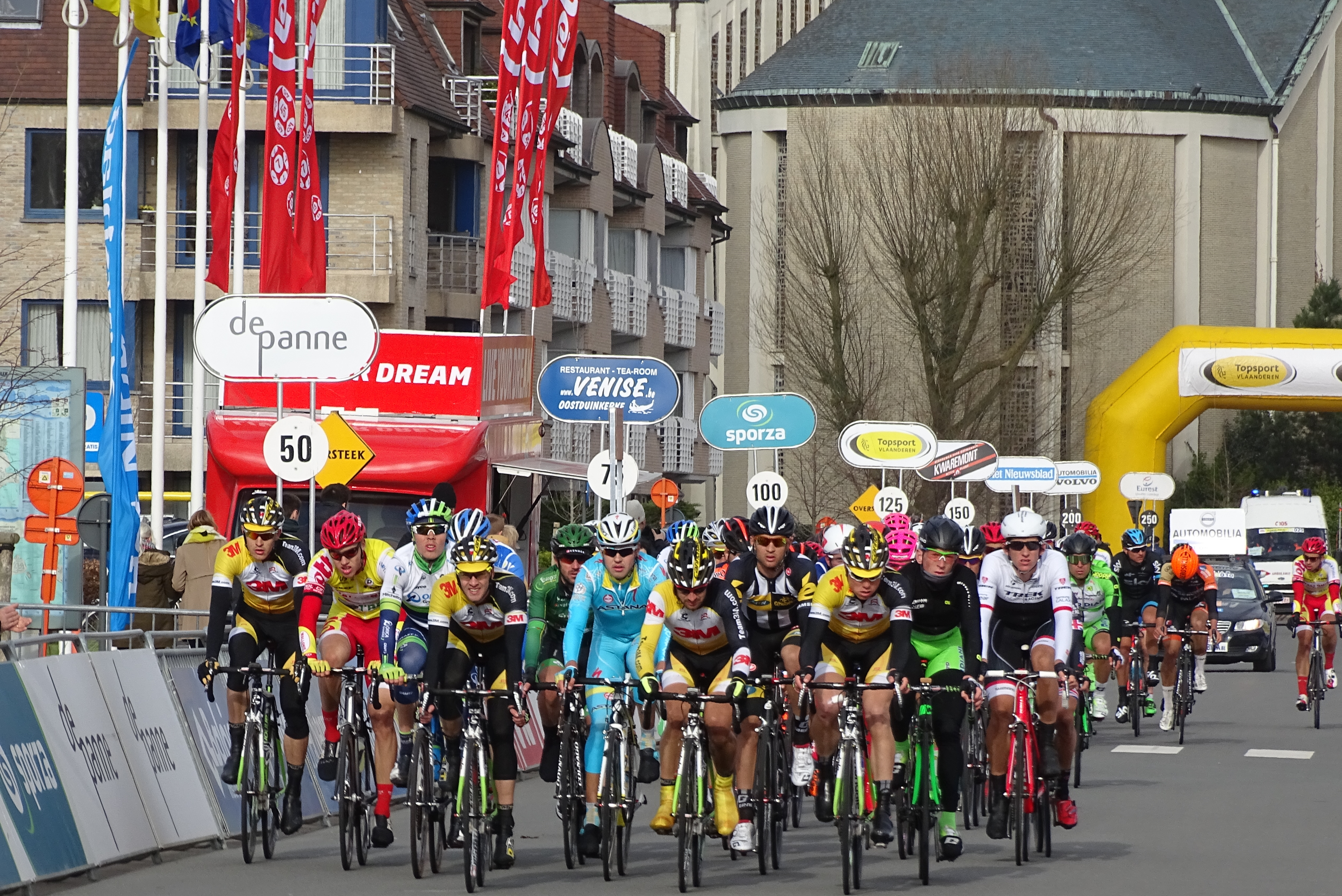 Reportage réalisé le mercredi 1er avril à l'occasion de l'arrivée de la deuxième étape des Trois jours de La Panne 2015 à Coxyde, Belgique.